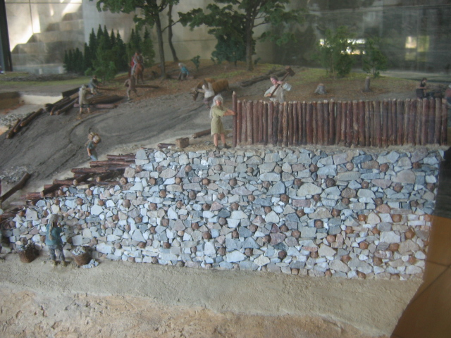 Maquette de la construction d'un murus gallicus (mur gaulois). Musée de la civlisation celtique, Bibracte, France.